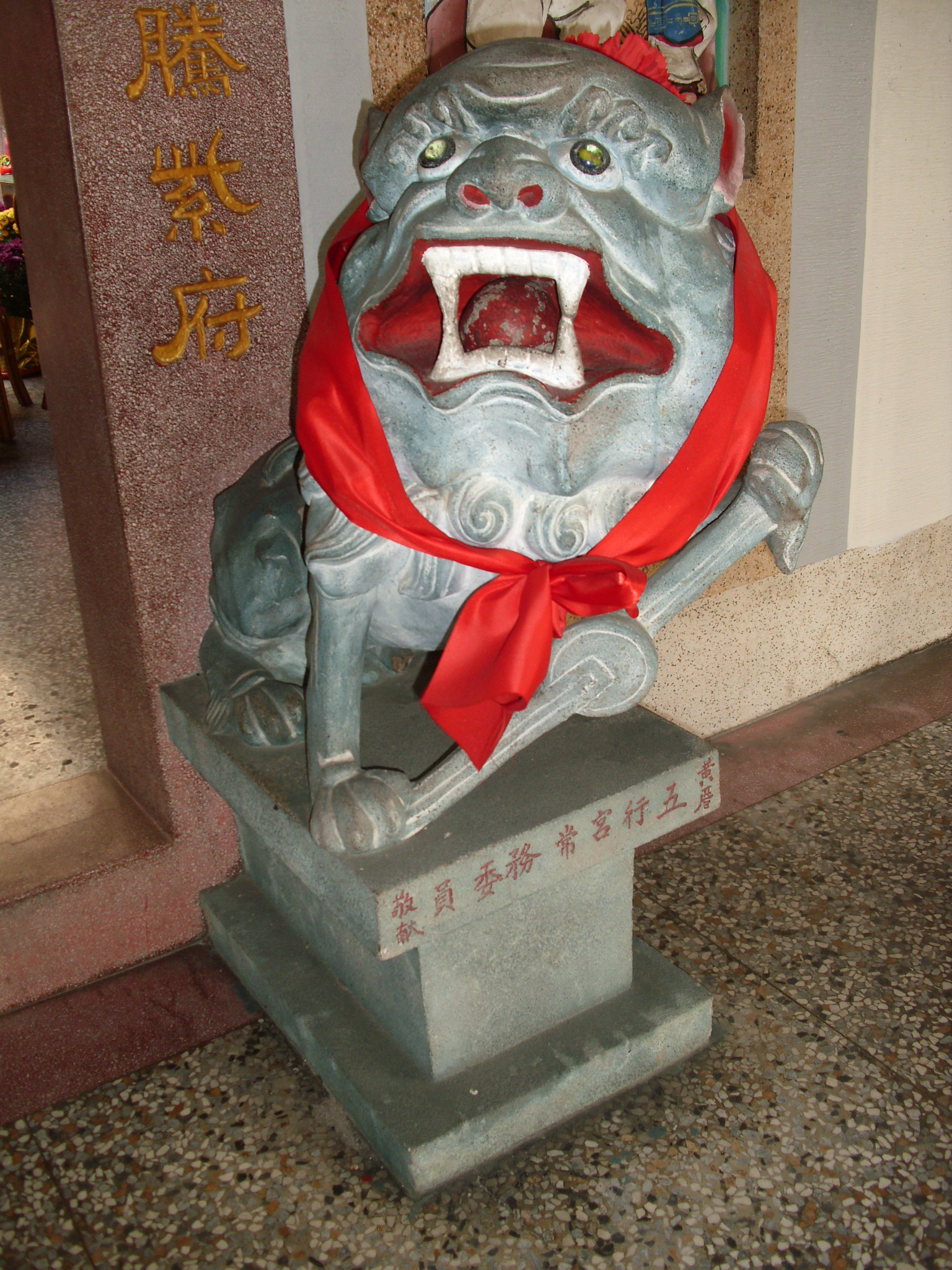 中文（台灣）: 水對賜福宮石獅（公），在彰化縣大村鄉美港村。